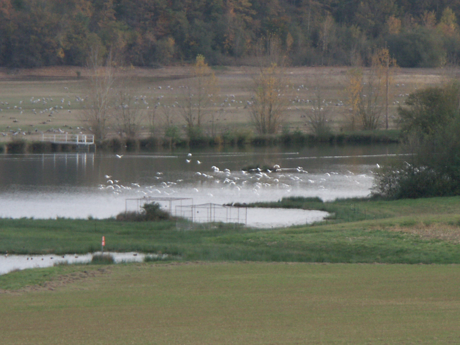 Le lac de Puydarrieux, Hautes-Pyrénées